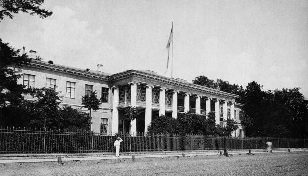 Дача Дурново. Фото 1880-х